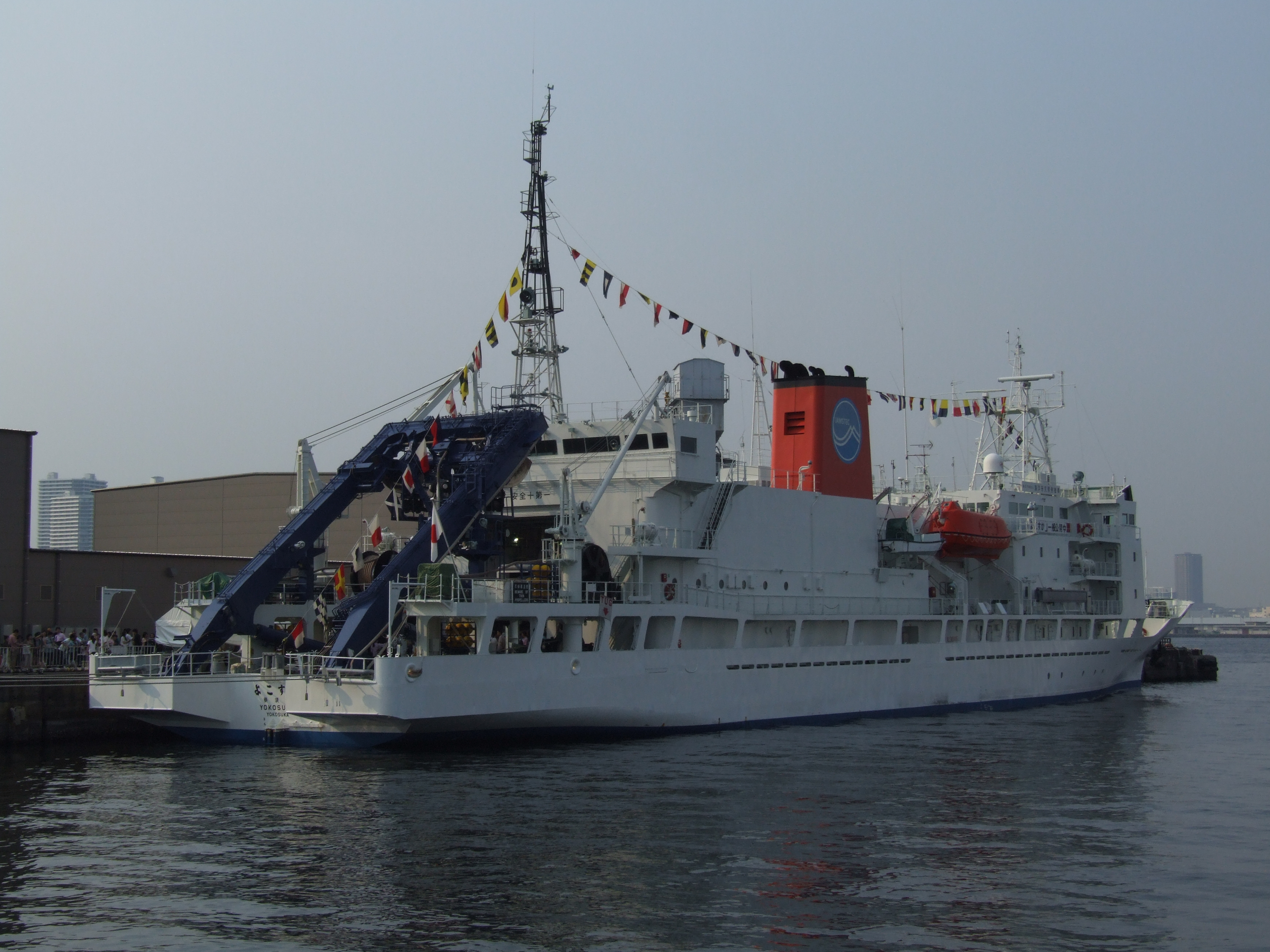 よこすか（横浜港開港150年の船内開放の為横浜港に接岸中）